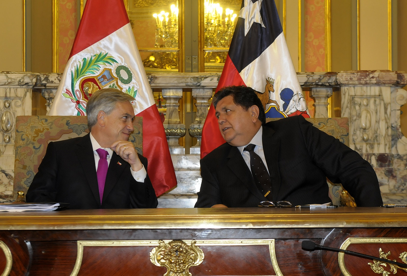 El Presidente de la República, Sebastián Piñera, junto a su par de Perú, Alan García, suscribió documentos de trabajo.